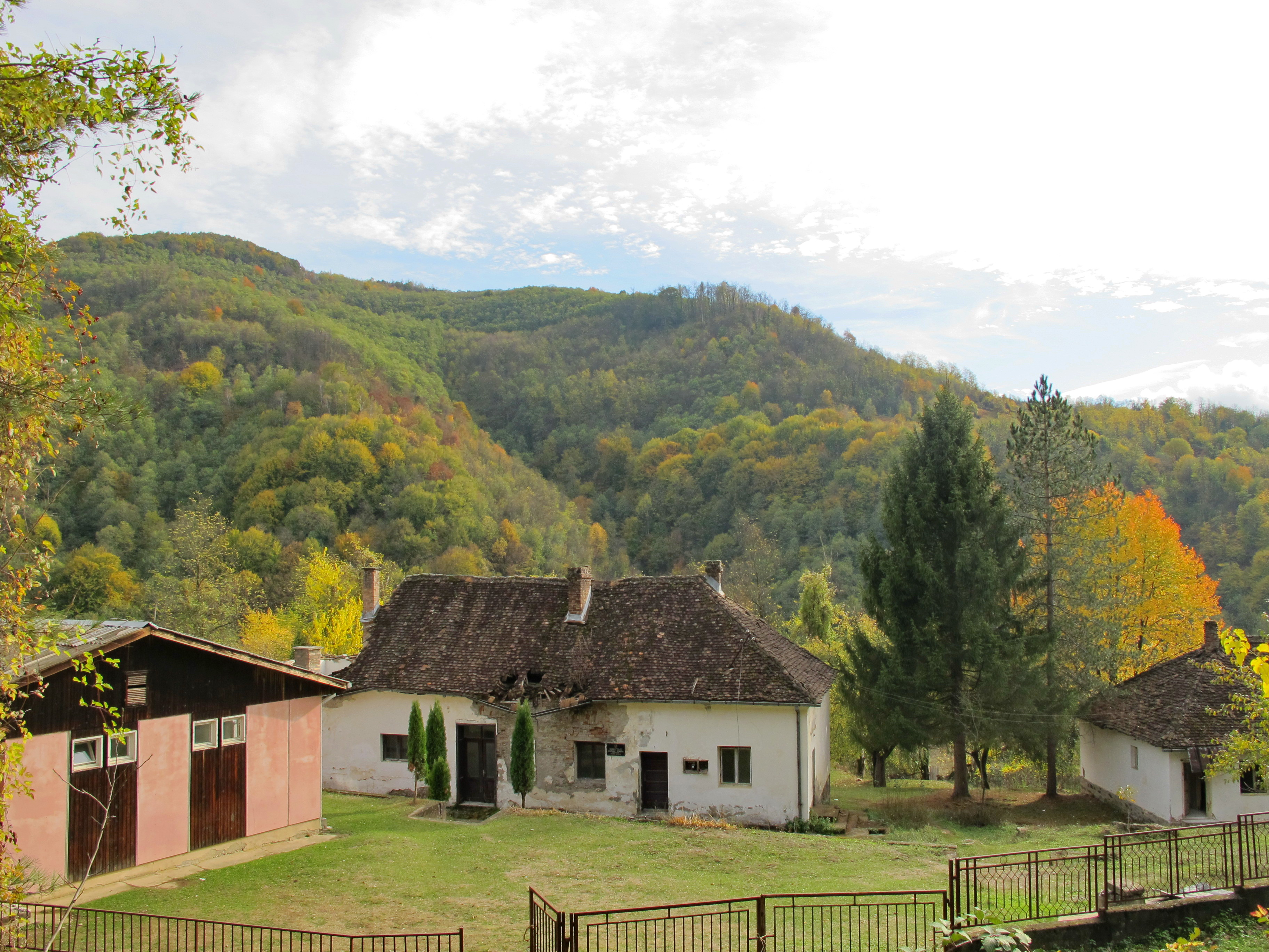 Цапарић.